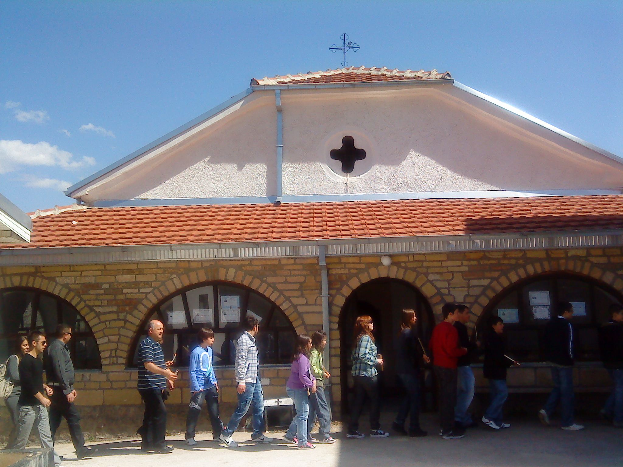 Црква Св.Богородица с.Ѓавато